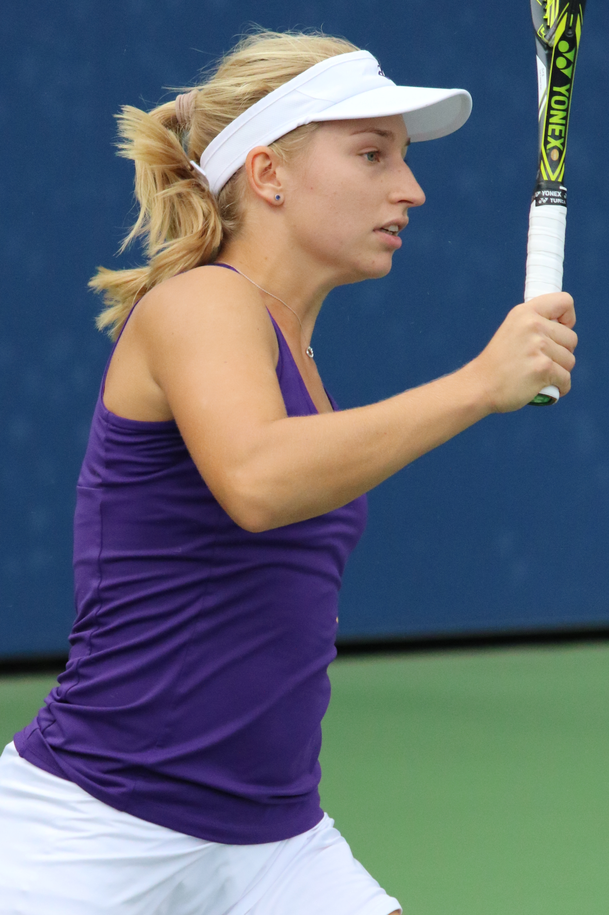 Gavrilova US16 (1)